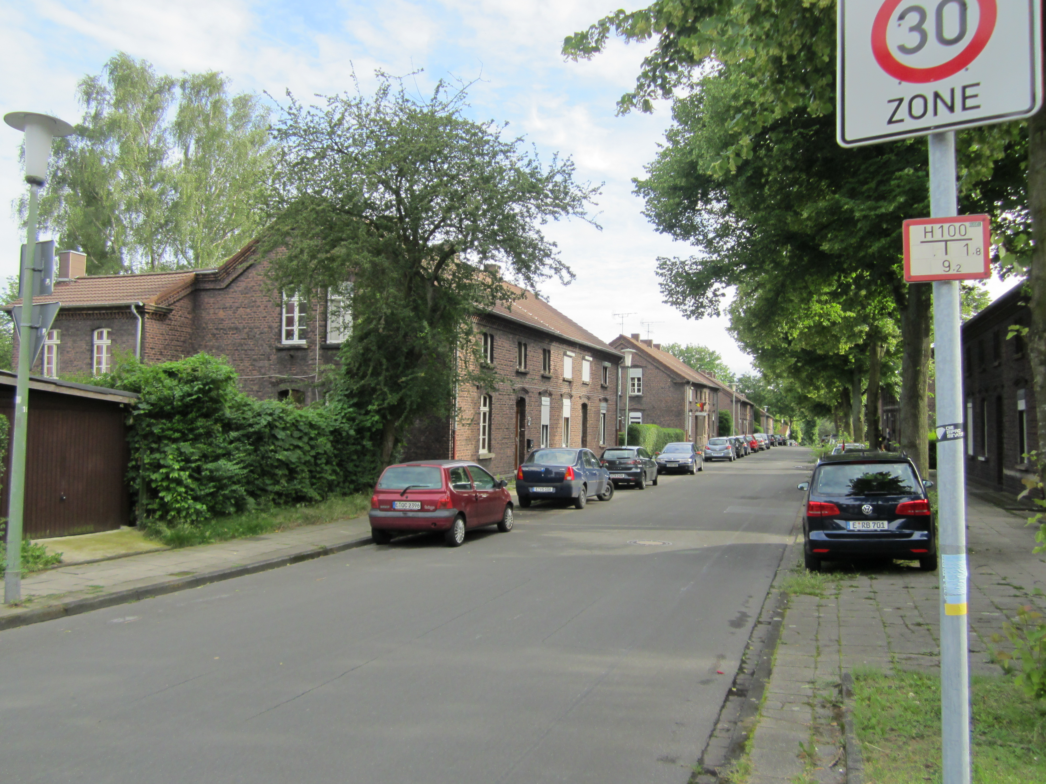 Kolonie Zollverein III in Essen-Katernberg; Blick in die Schlägelstraße, von der Ückendorfer Straße aus